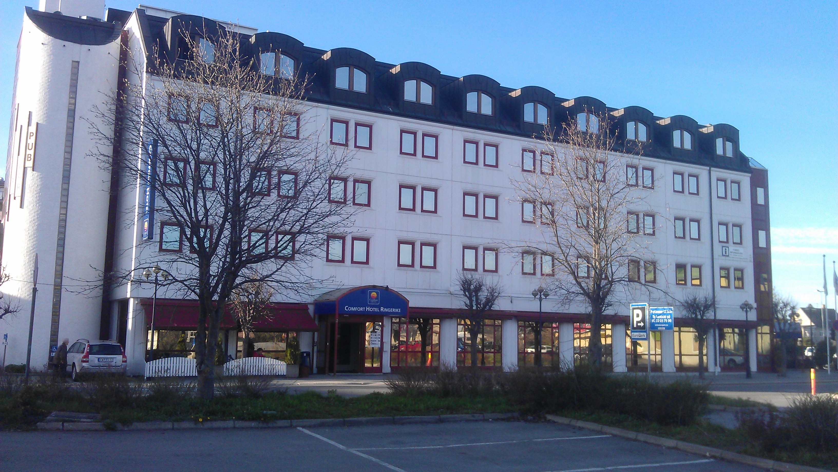 Comfort Hotel Ringerike i Hønefoss.